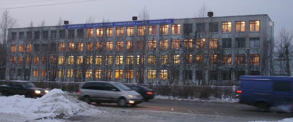 36 дом. Улица Карла Маркса. Филиал Гуманитарного института САФУ в Северодвинске. Фото А. Щекинова.